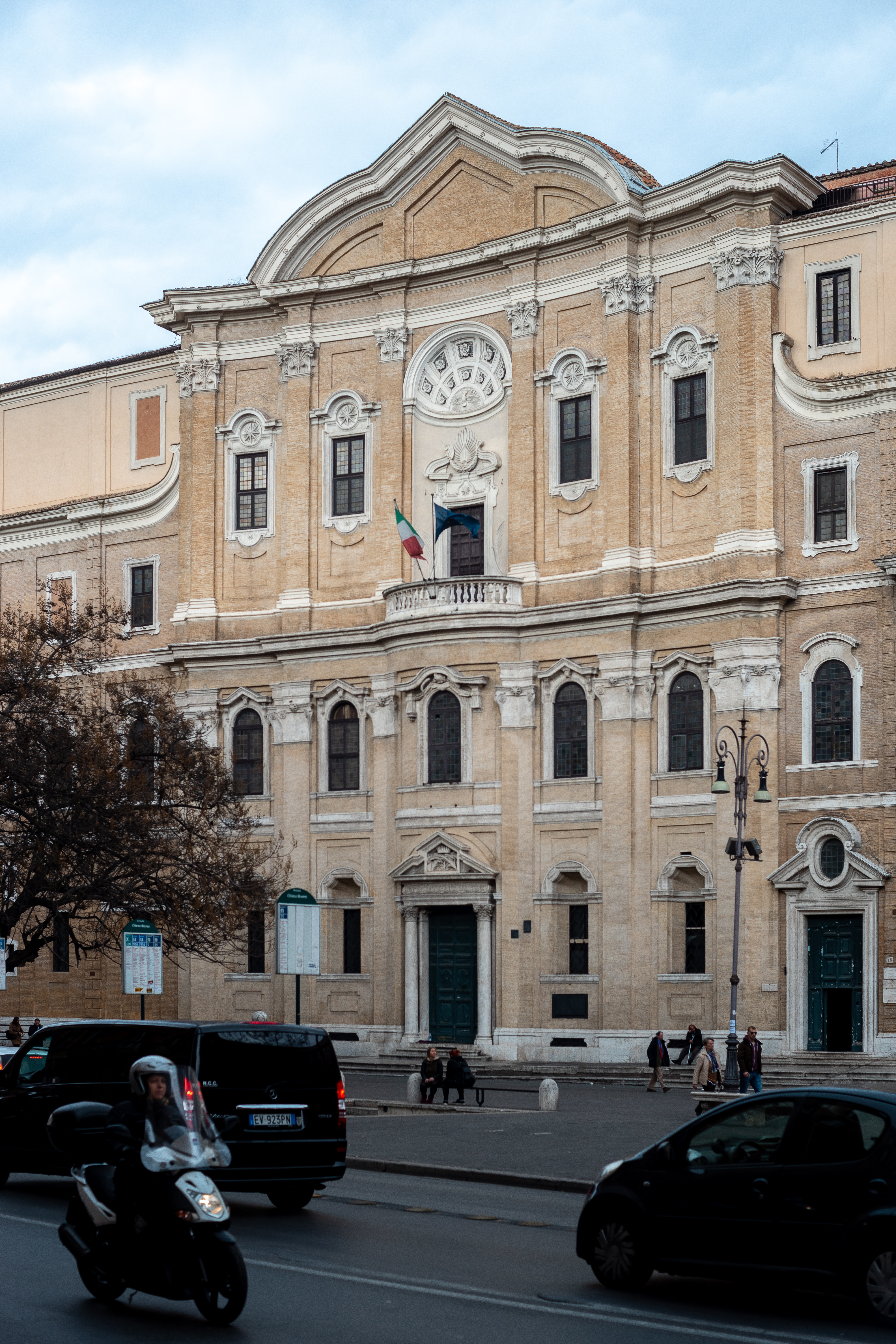 Fassadenansicht des Oratorium des San Filippo Neri von in Rom im Januar 2016. Erbaut von 1629 – 1637 von Francesco Borromini.